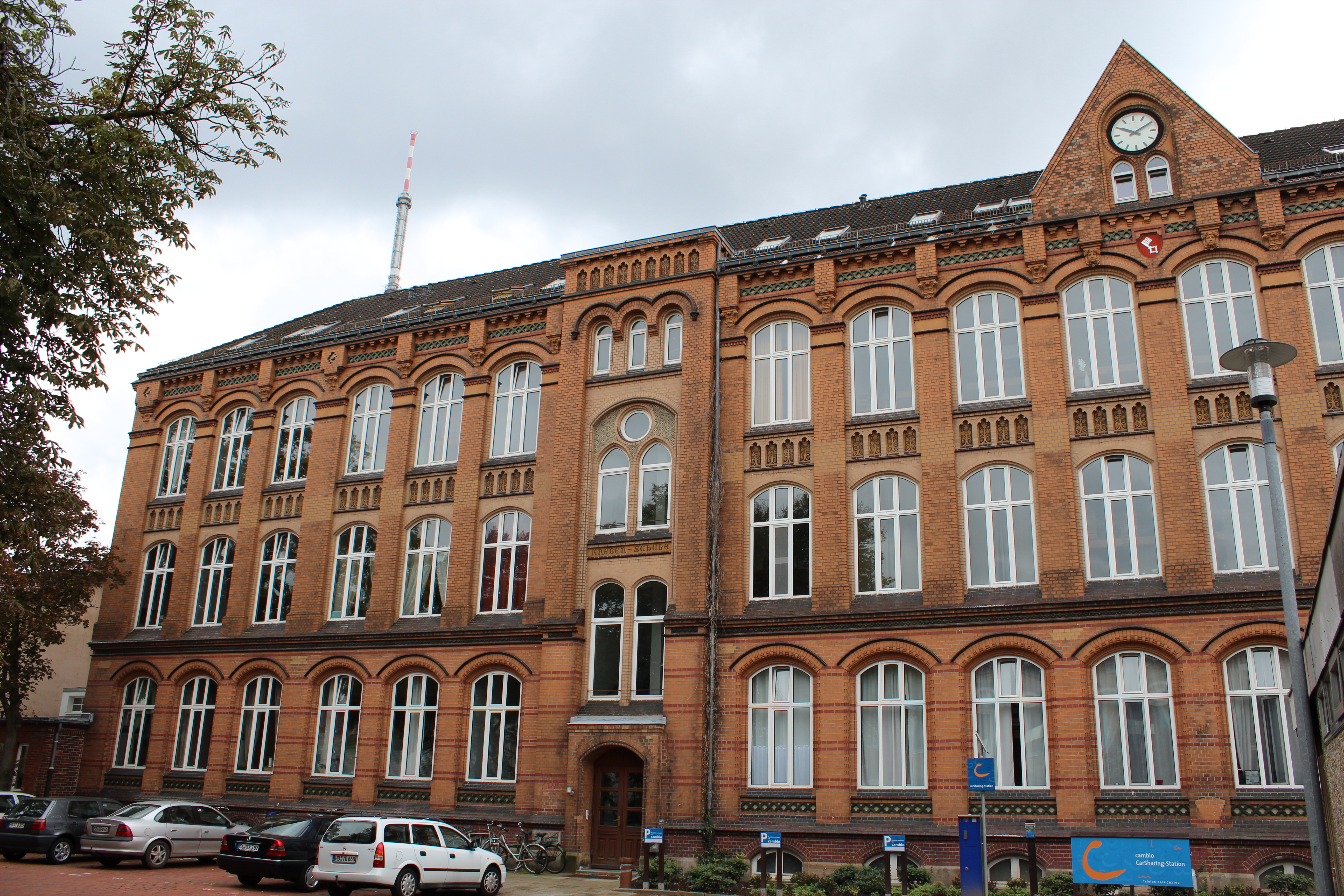 Elisabethschule in Bremen, Elisabethstraße 135 / Hoffnungstraße - Knabenschule.Das abgebildete Objekt ist ein geschütztes Kulturdenkmal in der Freien Hansestadt Bremen, mit der Nr. 0325 beim Landesamt für Denkmalpflege registriert.